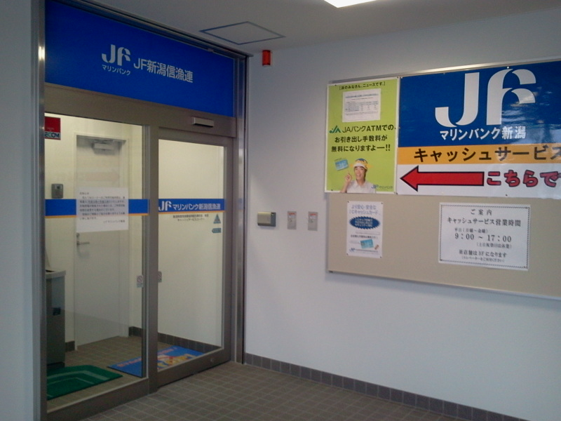 JF新潟信漁連のATM。